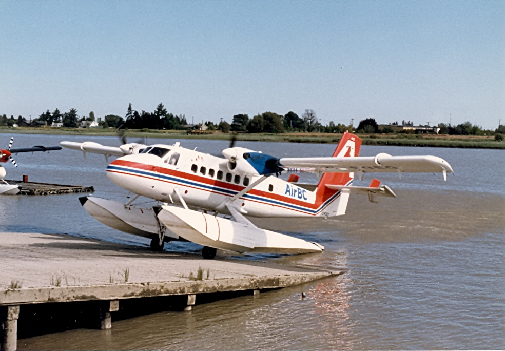 At Vancouver, B.C. on June 9, 1986.